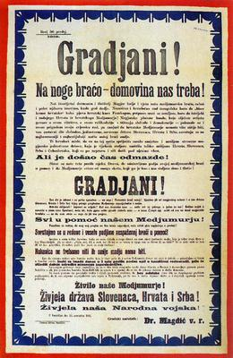 Poziv građanstvu na mobilizaciju u vezi vojnih operacija u vrijeme pripojenja Međimurja novostvorenoj Državi Srba, Hrvata i Slovenaca. Poziv je uputilo Poglavarstvo grada Varaždina, a potpisan je gradonačelnik dr. Magdić. Tisak: tiskara Stifler 13. studeni 1918. g.